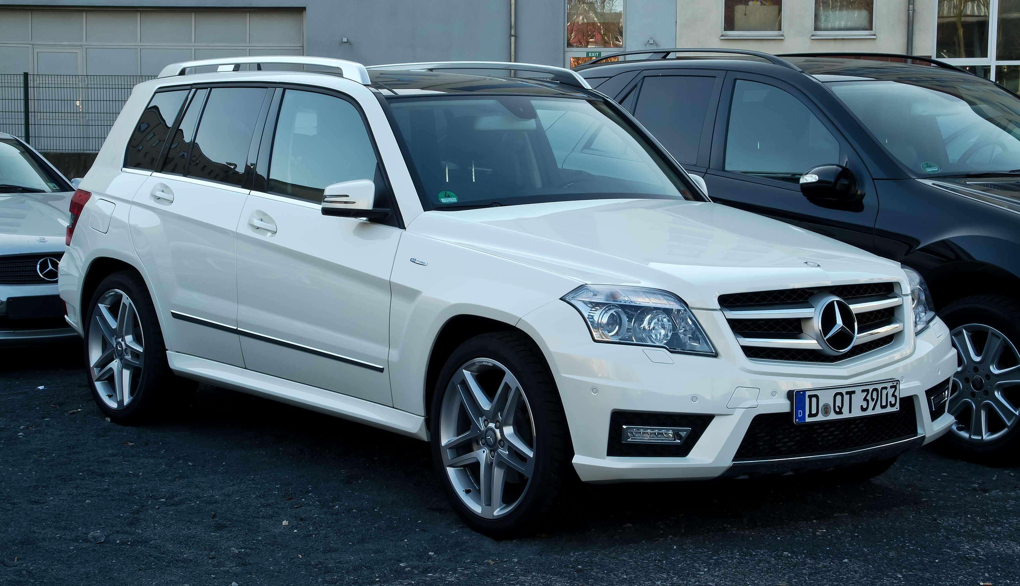 Mercedes-Benz GLK 220 CDI 4MATIC BlueEFFICIENCY Sport-Paket AMG (X 204)